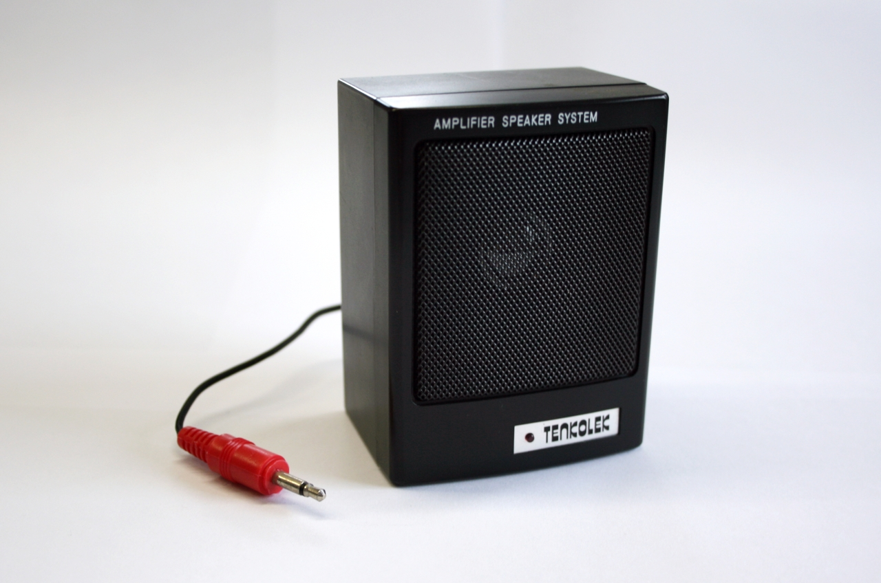 Dispositivo con scocca in plastica nera Nella parte alta si ha l'altoparlante protetto da una griglia forata, al centro si ha il vano per l'inserimento della cassetta chiuso da uno sportello parzialmente trasparente attraverso il quale sono visibili le testine di lettura/scrittura e di cancellazione, il rullo di presa del nastro magnetico, i perni motore e tornante per il trascinamento della cassetta, con un contagiri. Sotto si hanno i tasti per l'uso: registrazione, avvio, riavvolgimento, avanzamento veloce, stop/espulsione cassetta, pausa Lateralmente si hanno i connettori per il cavo di collegamento alla rete elettrica e per il collegamento al computer Sotto si ha il vano batterie per 4 semitorce da 1,5V Si ha inoltre una cassa acustica esterna con altoparlante con boccole per collegamento al registratore, interruttore di accensione e il vano batterie per 4 stilo Si hanno inoltre i cavetti per il collegamento della cassa al registratore, del registratore al computer, del registratore alla rete elettrica Inoltre sono presenti 47 cassette contenenti programmi e giochi. Funzione Collegato ad un homecomputer come il Sinclair ZX Spectrum +, era utilizzato come memoria esterna per giochi e software.